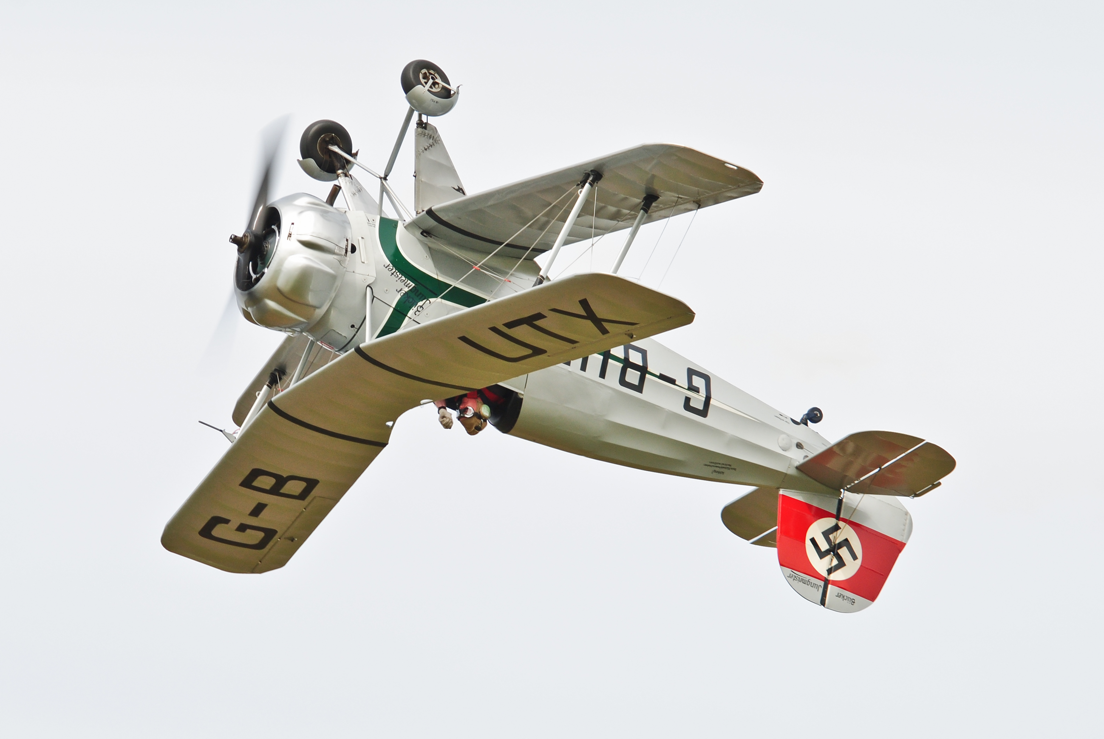 Bucker Bu133 Jungmeister taken at Shoreham Airshow 2013